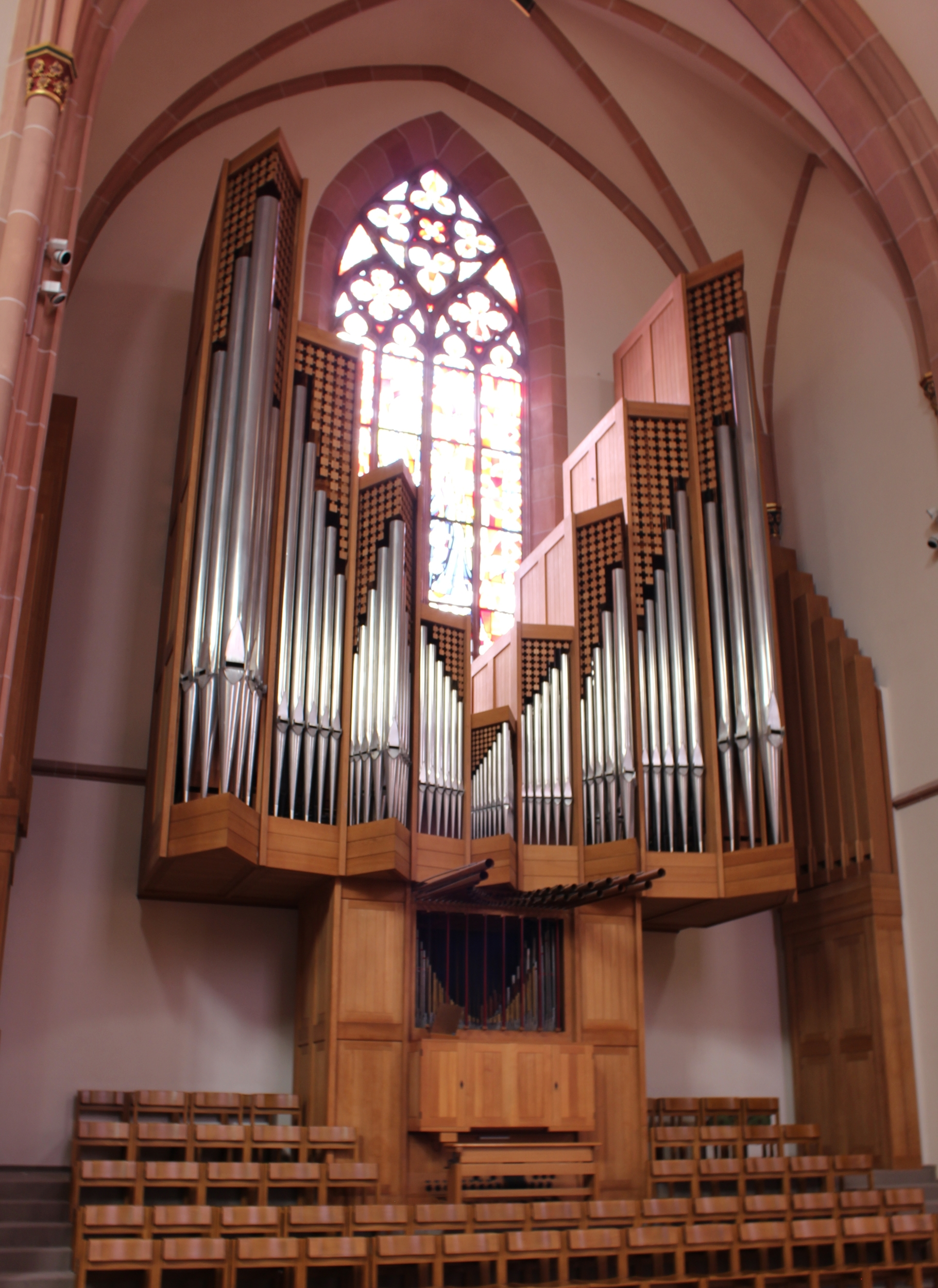 Chor-Orgel St.Peter & Paul Bühl Firma Rieger Orgelbau